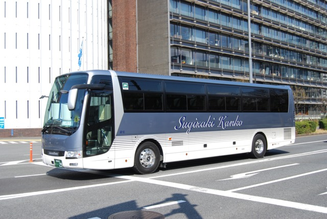 貸切観光バス